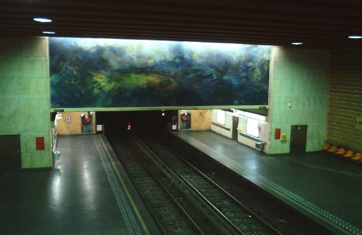 Perrons van het Brusselse metrostation Zwarte Vijvers